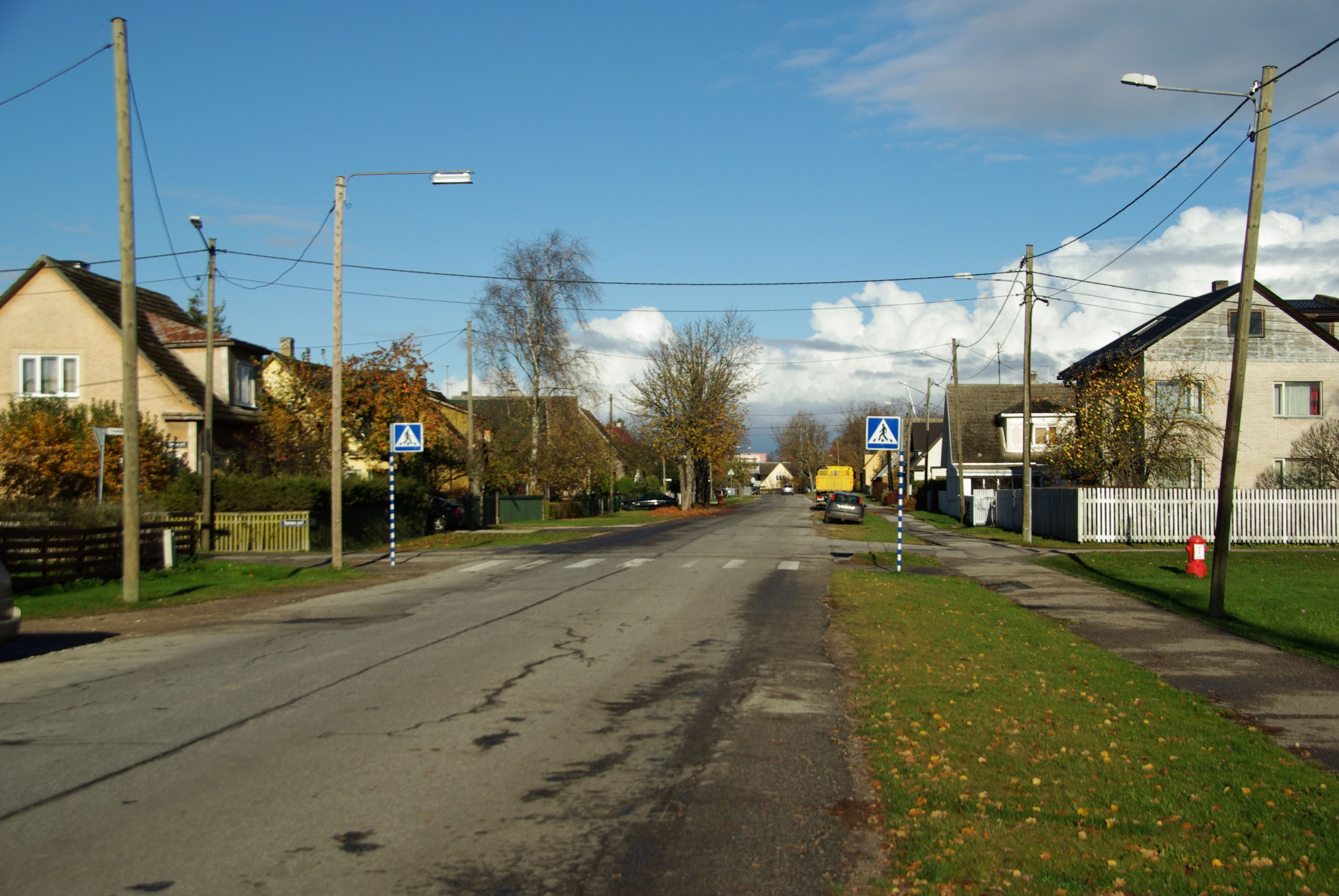 tänav Tartus Tammelinnas